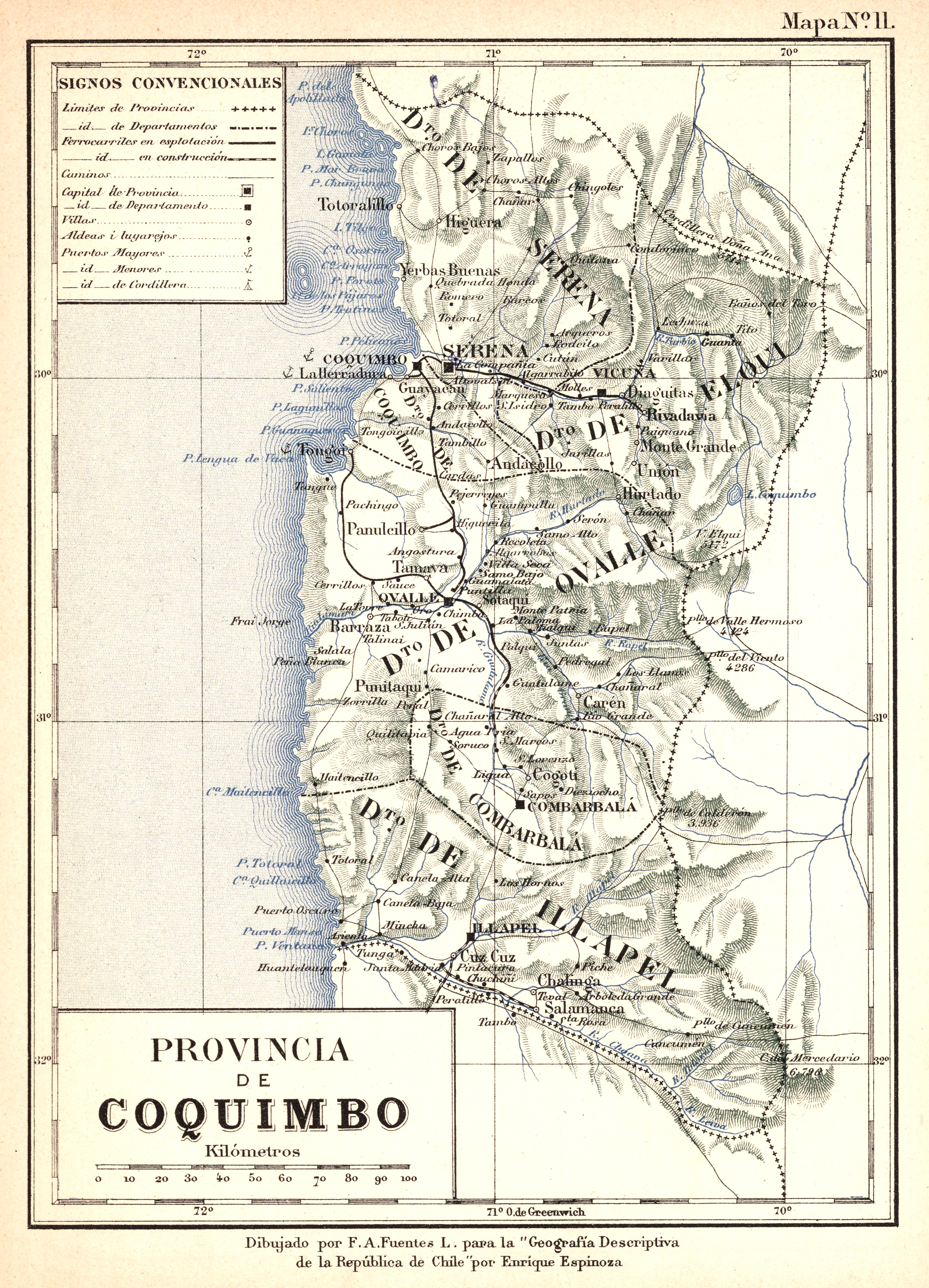 Mapa de la antigua Provincia de Coquimbo, equivalente a la actual IV Región de Coquimbo, Chile, hacia 1895.